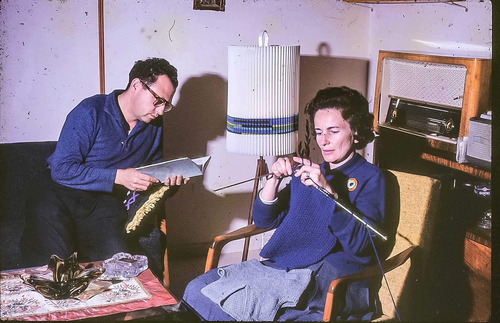 צבי כרמל ואישתו קטיה במעוז אביב